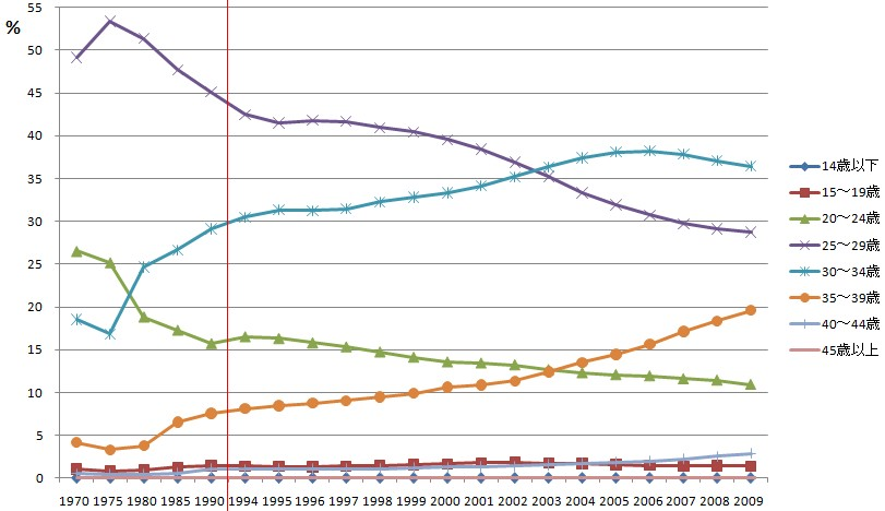 出産時の母親の年齢を階級別の割合の推移を示したグラフである。1994年以降は1年ごとのデータであるが、1970年から1990年までのデータは5年ごとのデータである。